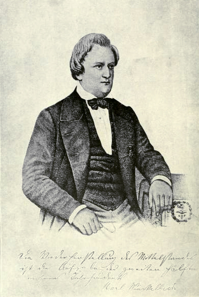 Porträt Karl Georg Winkelblech (Pseudonym: Karl Marlo), Frontispiz zu: Biermann, K. G. Winkelblech, Leipzig 1909. Der handschriftliche Text lautet: "Die Wiederherstellung des Mittelstandes ist die Aufgabe der zweiten Hälfte unseres Jahrhunderts. Karl Winkelblech"